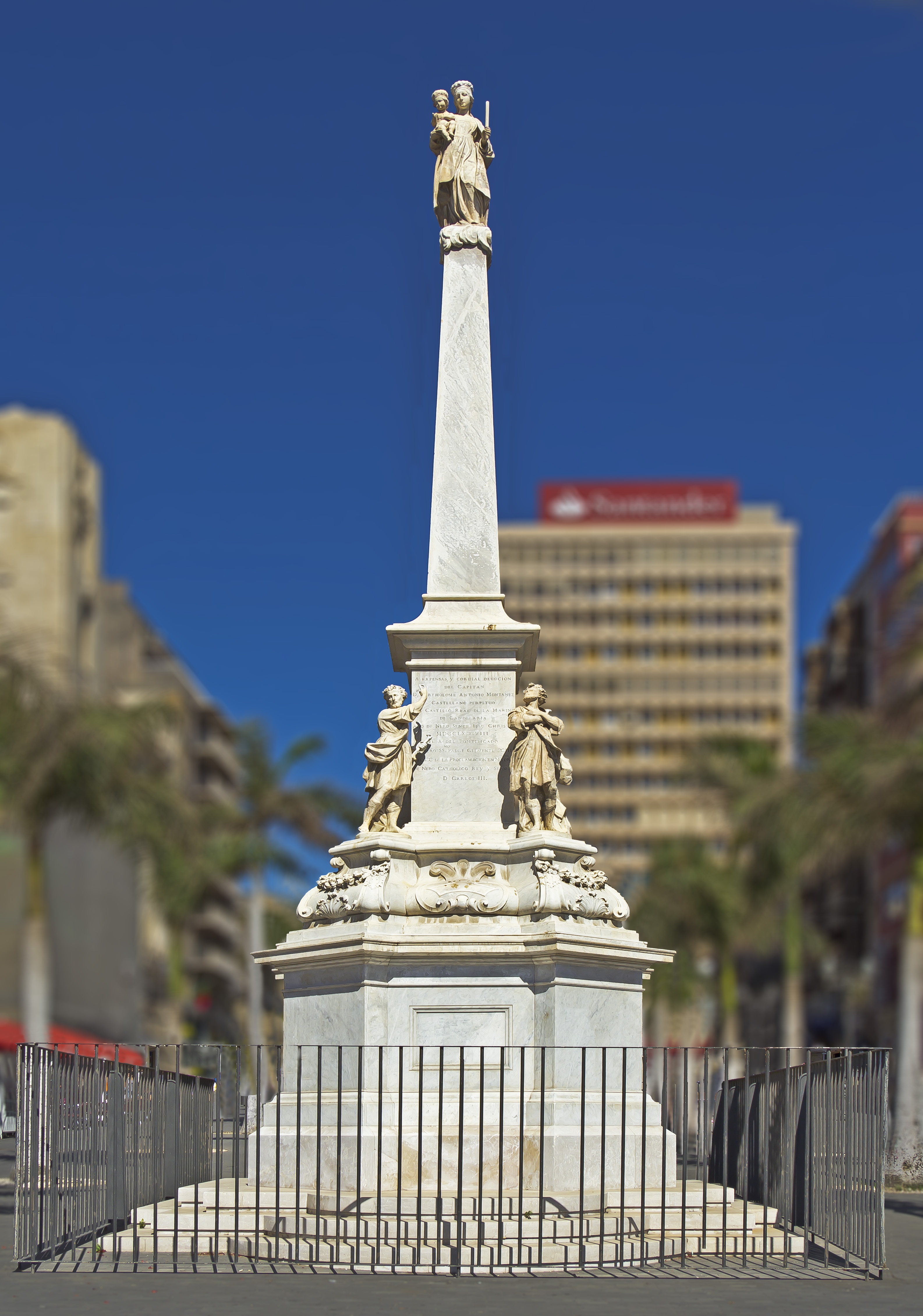 Das Denkmal der Candelaria wurde 1778 von dem aus Genua stammenden Bildhauer Pasquale Bocciardo geschaffen.